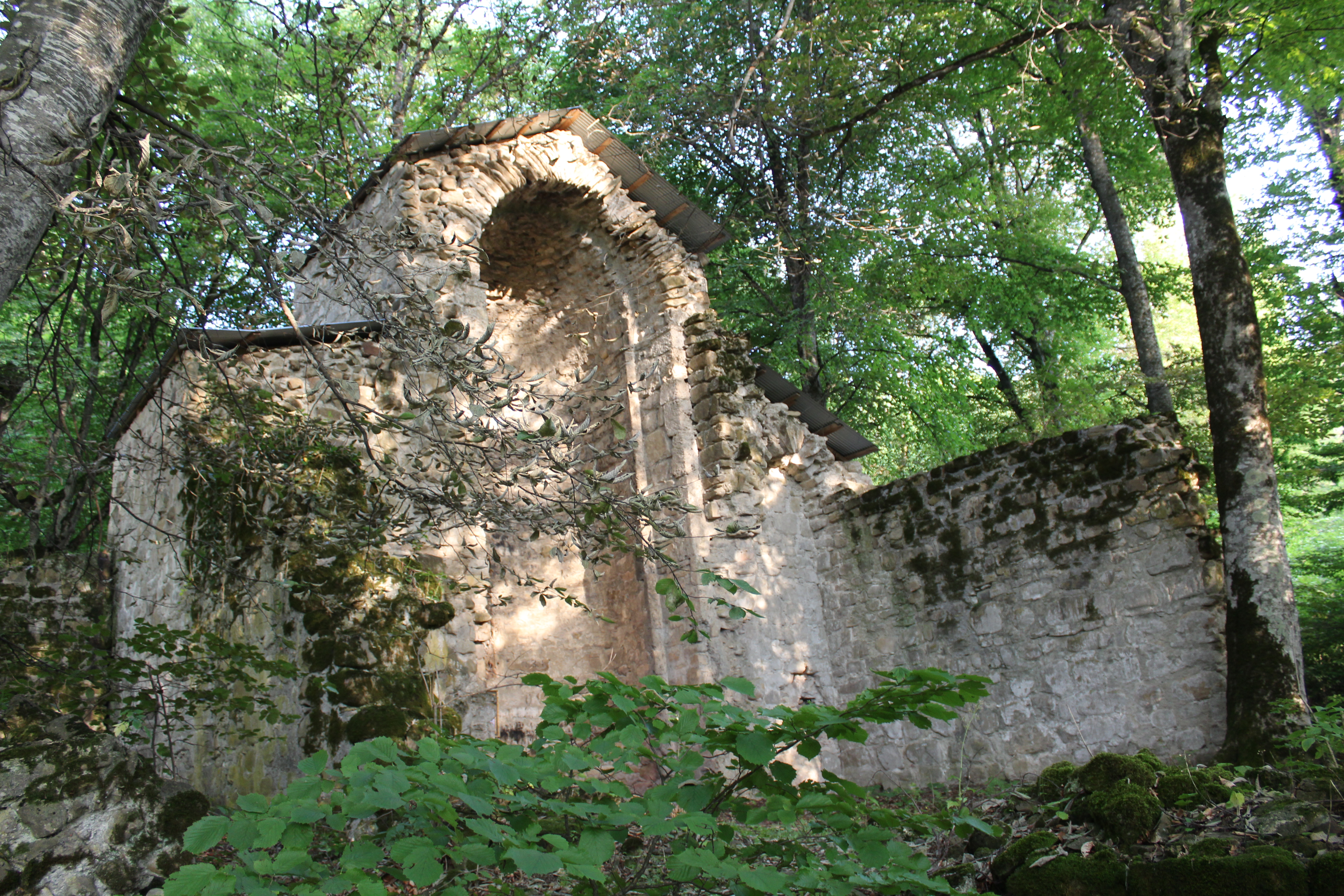 ვაჩნაძიანის ყველაწმინდა - წმ. გიორგის ეკლესია